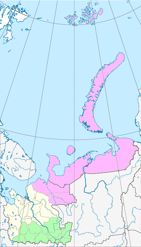 Архангельская митрополия